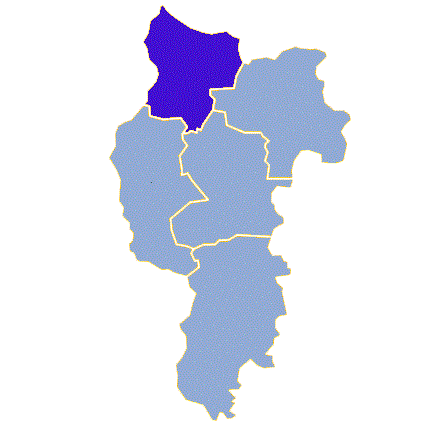 Powiat słubicki - Gmina Górzyca